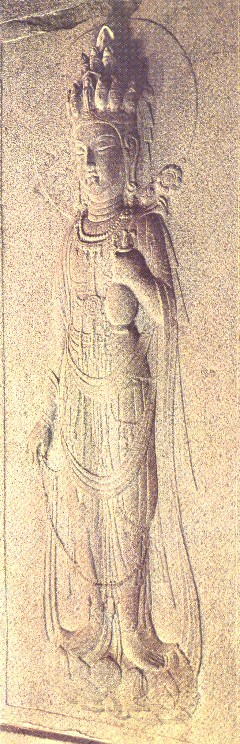 경주석굴암십일면관음보살입상. 8세기 남북국시대 신라.